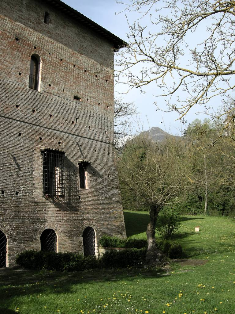 Antico Mulino agritourism